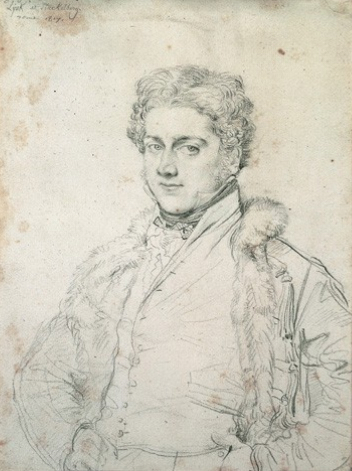 Charles Robert Cockerell (* 28. April 1788 in London; † 17. September 1863 ebenda), britischer Architekt und Klassischer Archäologe